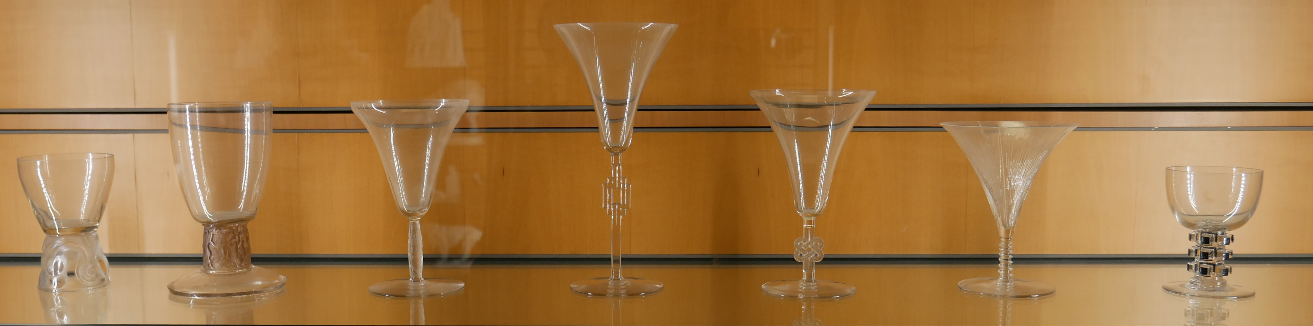 Verre pressé moulé Achat auprès de l’artiste, 1926 De gauche à droite - Verre à bordeaux Marienthal - Verre à frise de personnages - Verre à bourgogne Logelbach - Verre à eau Haguenau - Verre à Molsheim - Verre Liseron